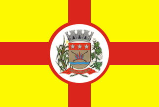 Bandeira de - SP - Brasil.